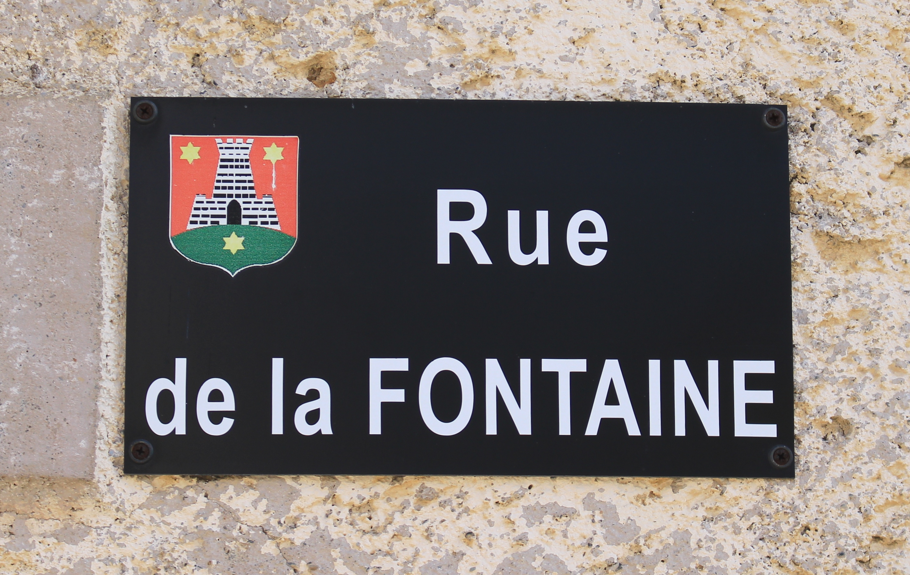 Rue du village de Julos (Hautes-Pyrénées)